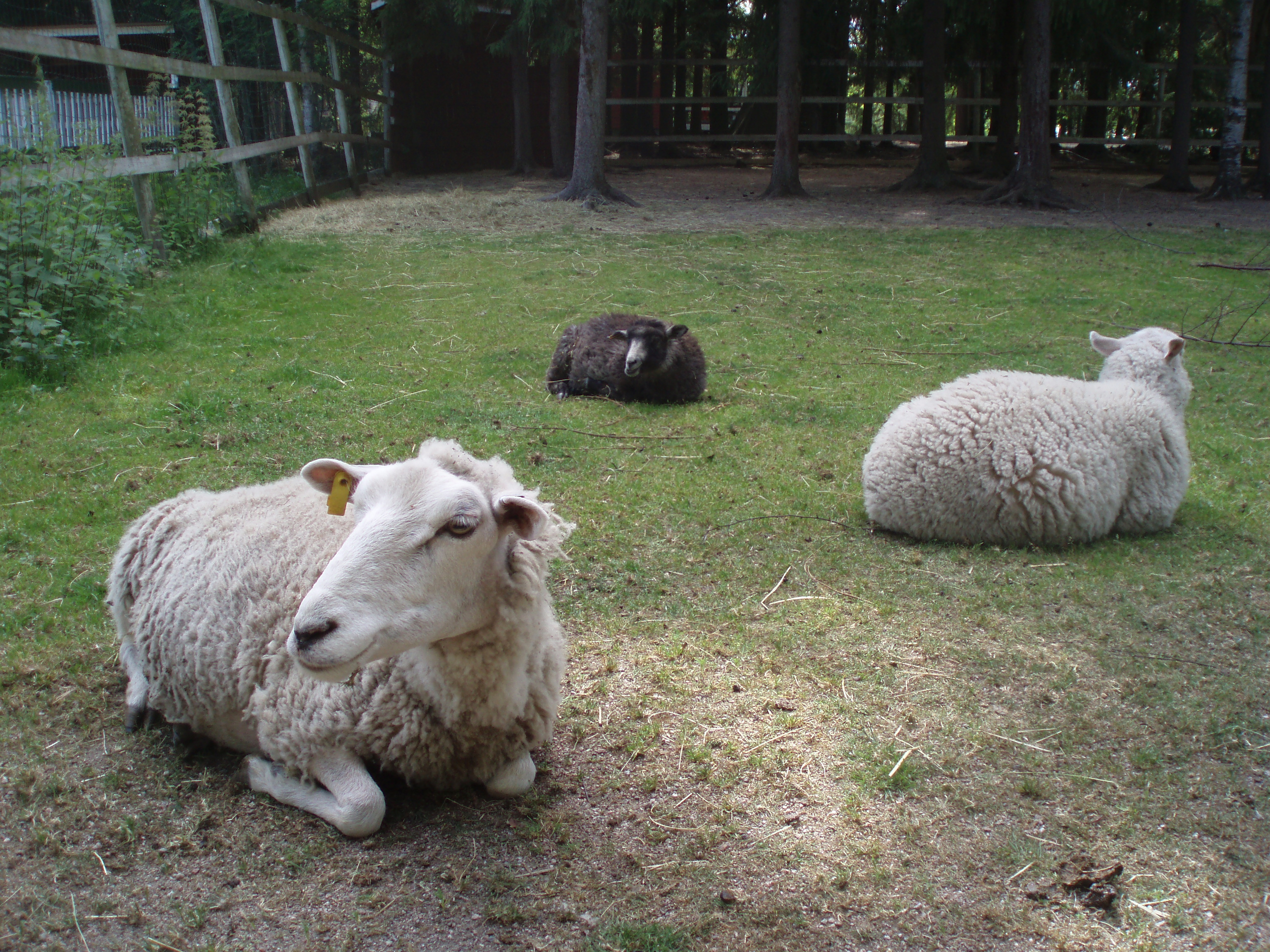 Lampaita Orimattilan kotieläinpuistossa kesällä vuonna 2009